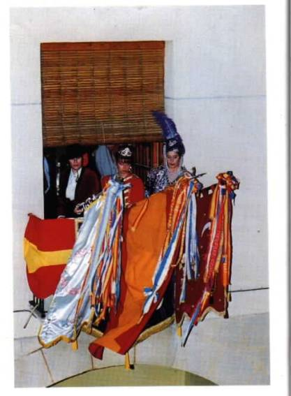 Día del Pregón: "Las abanderadas de las tres comparsas ondean las banderas a los acordes del Himno Nacional"